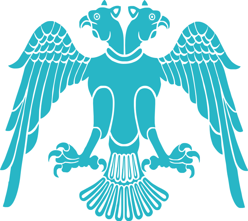 Selçuklu kartalı